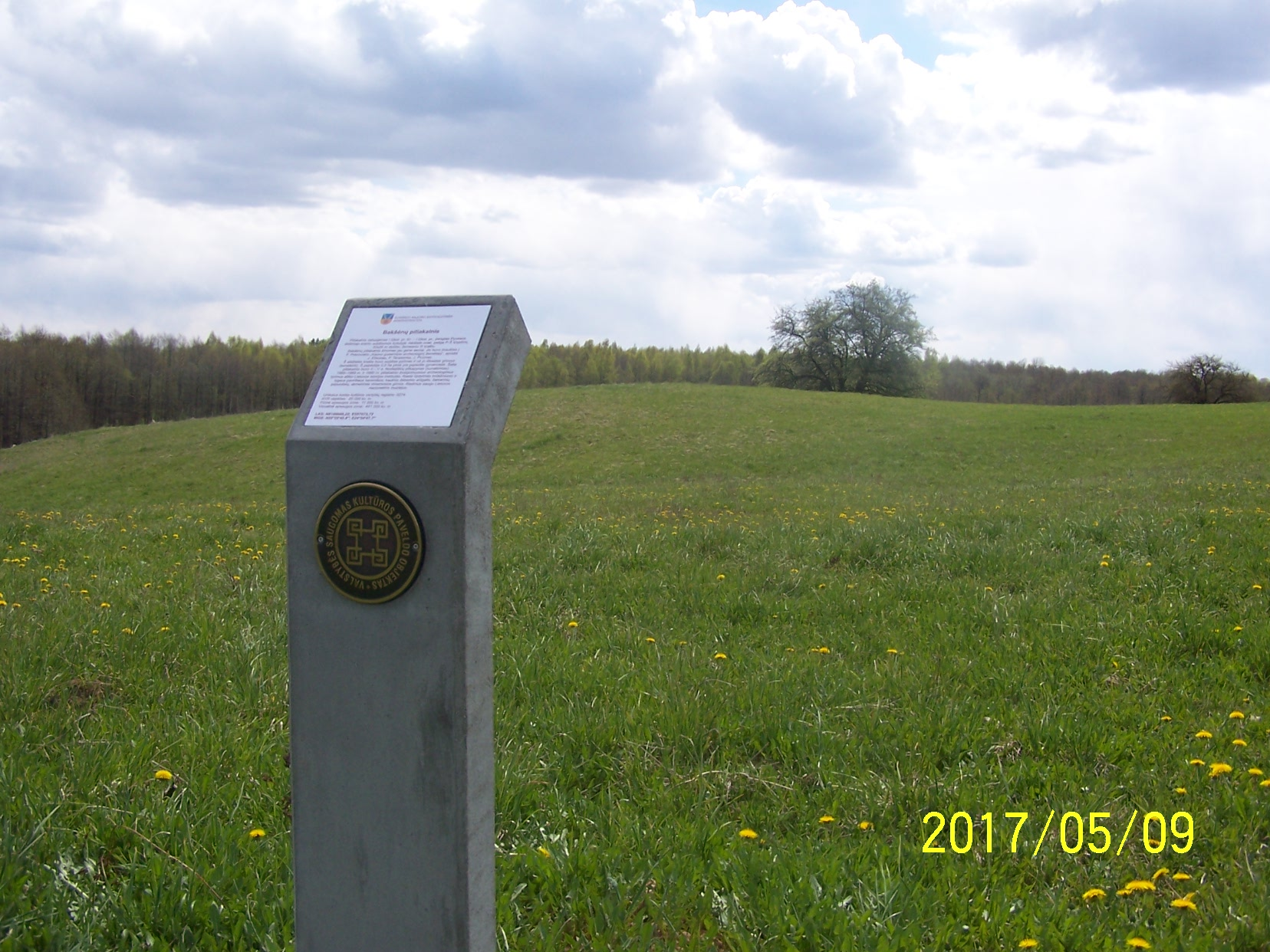 Bakšėnų piliakalnis